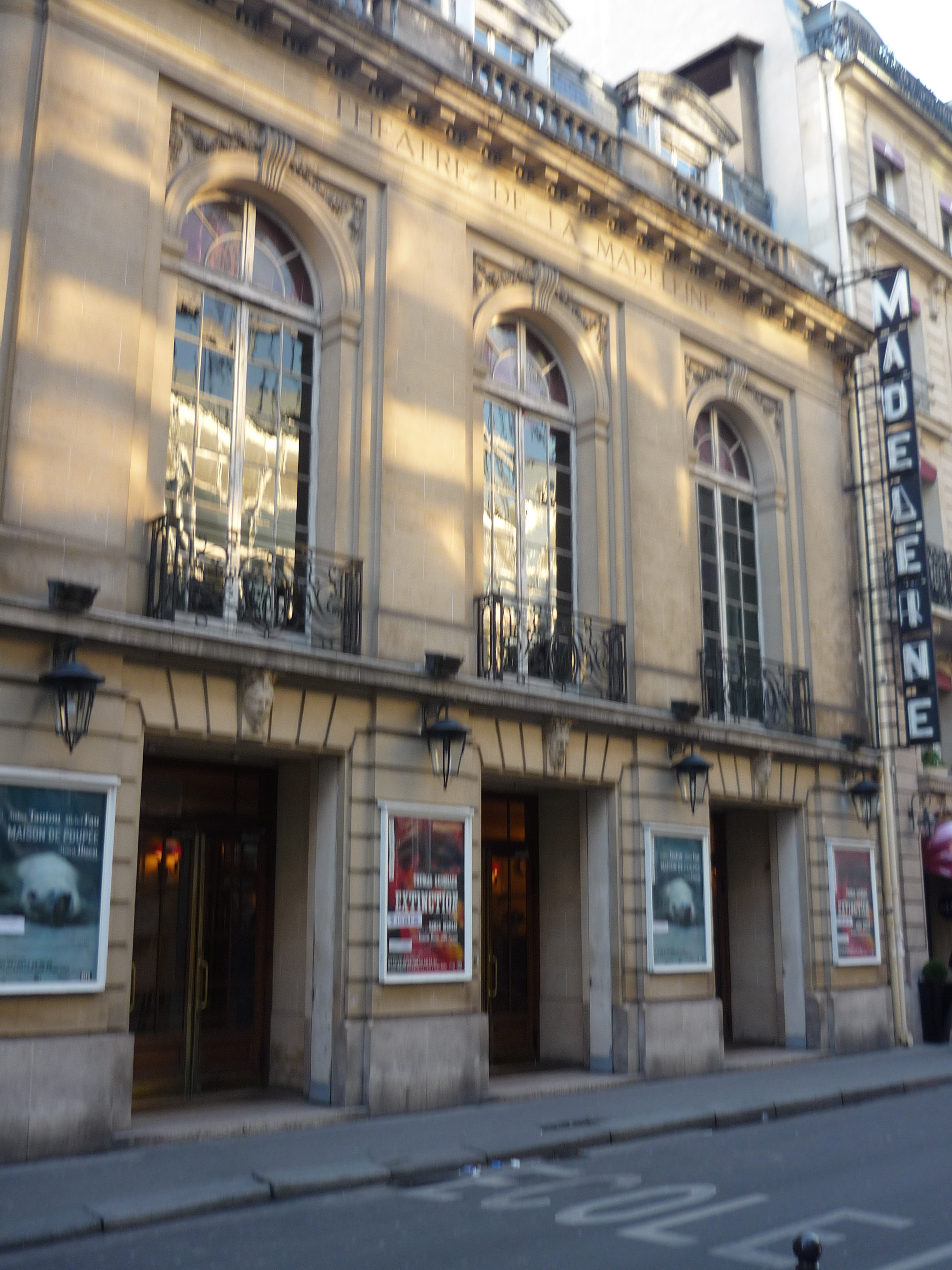 Le Théâtre de la Madeleine en 2010